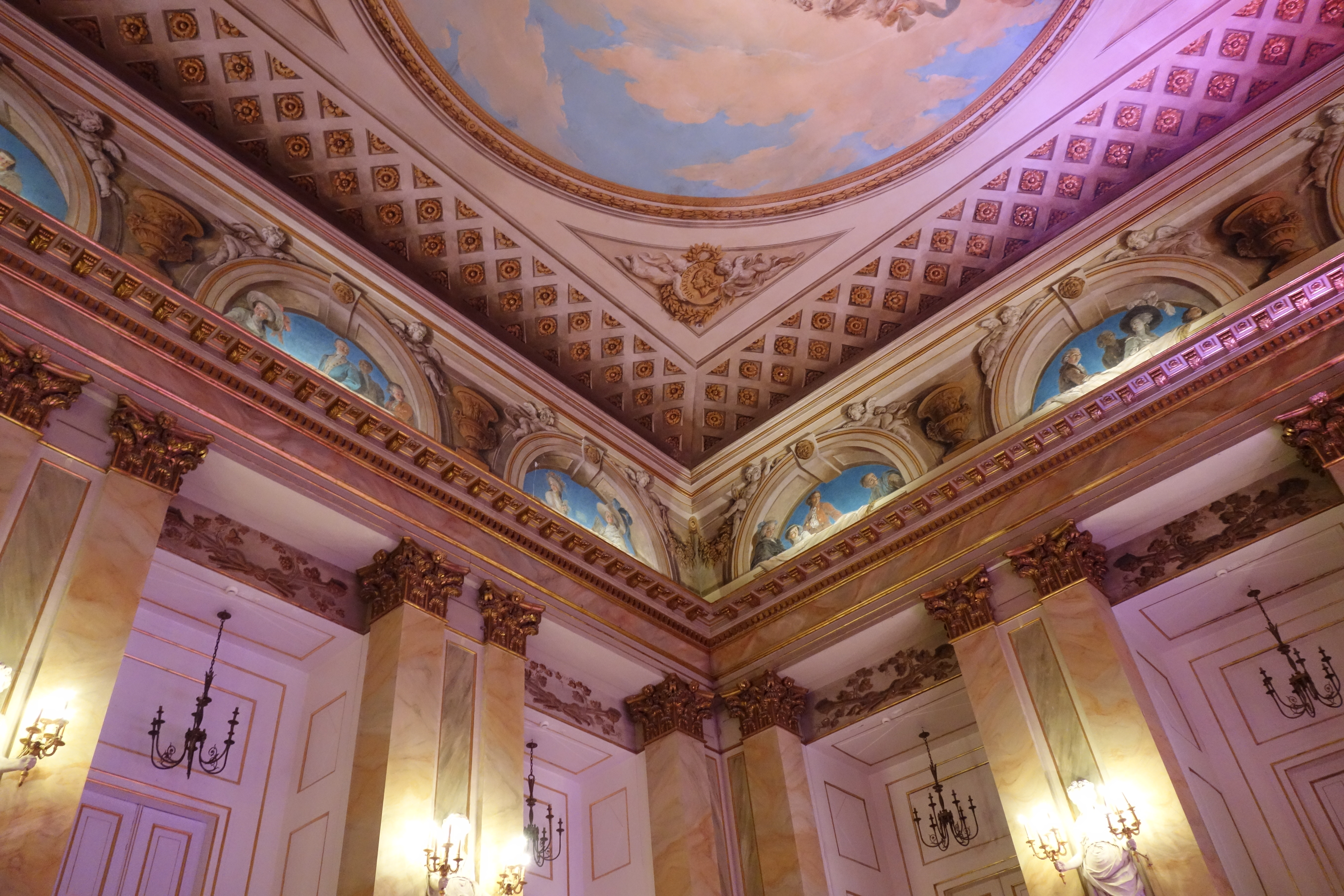 Wnętrze Teatru Królewskiego w Warszawie